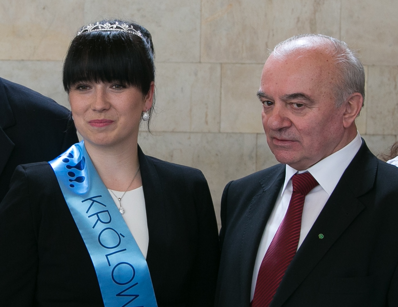 Mleko Expo 2013, Opening ceremony, November 6th, 2013, here: Katarrzyna Gajownik (Polish Dairy Queen) and Polish Agriculture Minister Stanisław Kalemba (Minister Rolnictwa i Rozwoju Wsi)